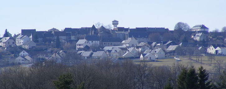 Vue générale d'Herment (63470)